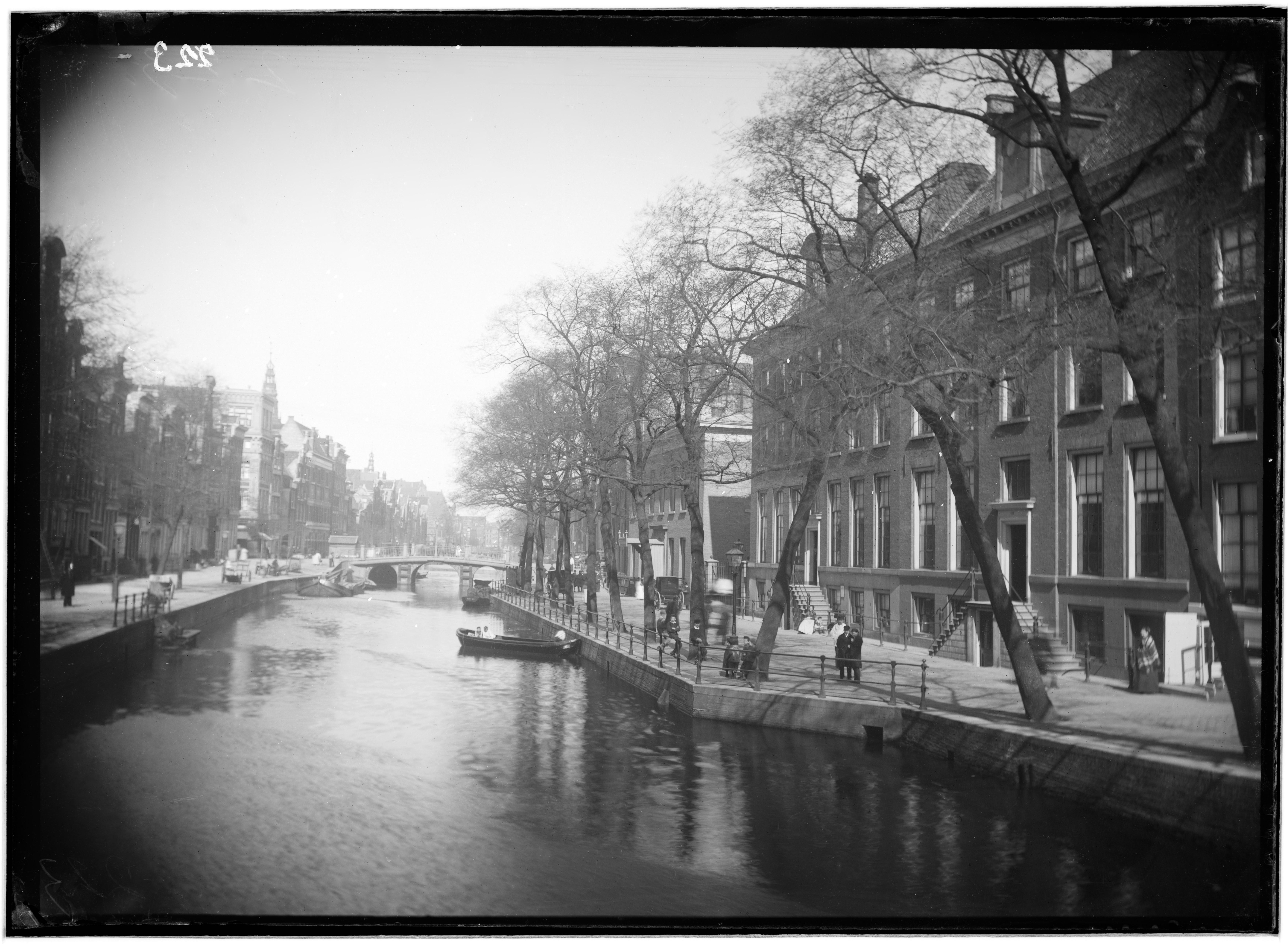 Beschrijving De Oudezijds Voorburgwal gezien in noordelijke richting naar de Varkenssluis (Brug 204) tussen de Damstraat (links) en de Oude Doelenstraat (rechts) Rechts het Stadhuis, Oudezijds Voorburgwal 195-199. Vlak voor de brug is een oude urinoir te zien. Documenttype foto Vervaardiger Gebroeders Douwes (uitgever) Collectie Collectie Kunsthandel Gebr. Douwes: glasnegatieven Datering 1868 t/m 1903 Geografische naam Oudezijds Voorburgwal Inventarissen Afbeeldingsbestand B00000031257 Generated with Dememorixer